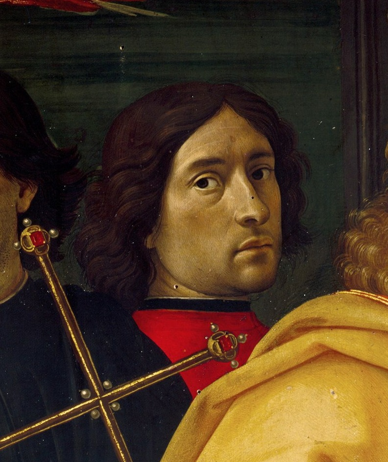 Pala degli innocenti, ghirlandaio, autoritratto